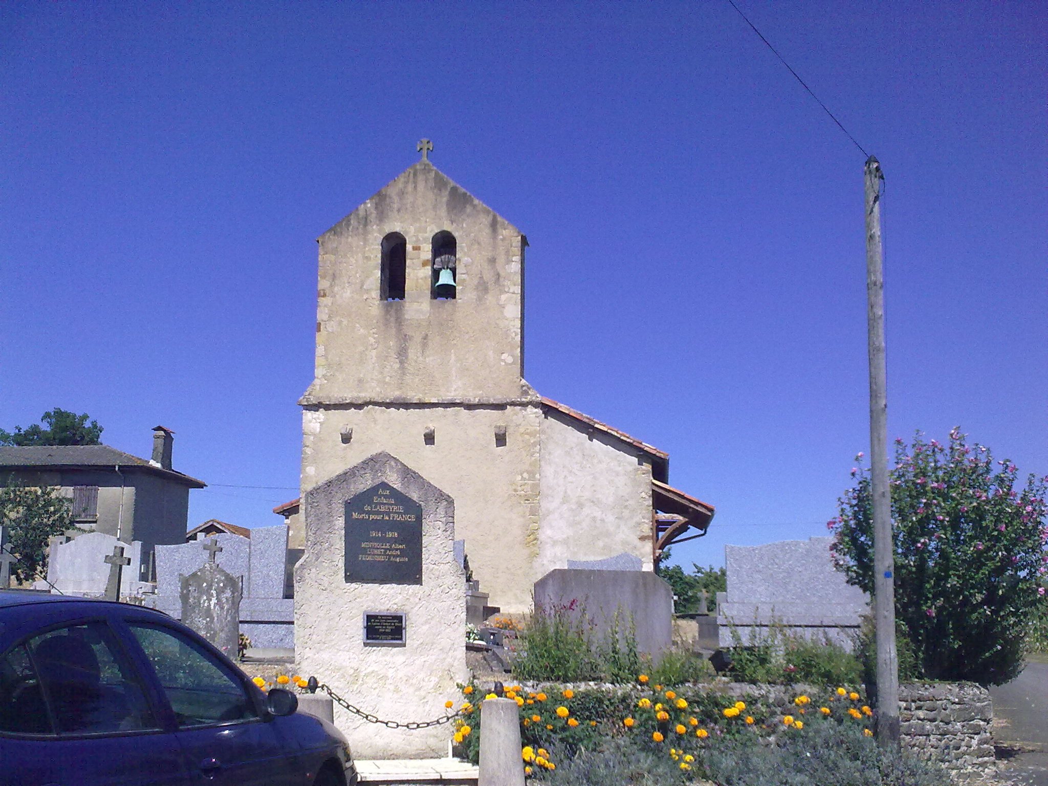 Labeyrie (Pyrénées-Atlantiques) le 18 juillet 2010, France.